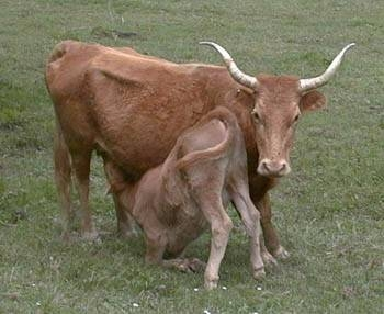 Betizu behia bere txahalarekin